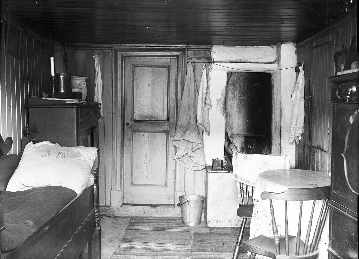 Interiör från ett spisrum i den östra nödbaracken, uppförd efter stadsbranden i Sundsvall 1888.